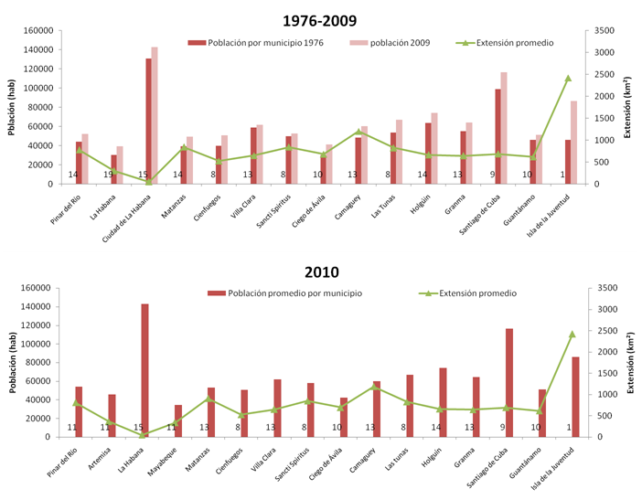 Comparación de la población y extensión de los municipios cubanos por provincias entre 1976 y 2010. División Político Administrativa